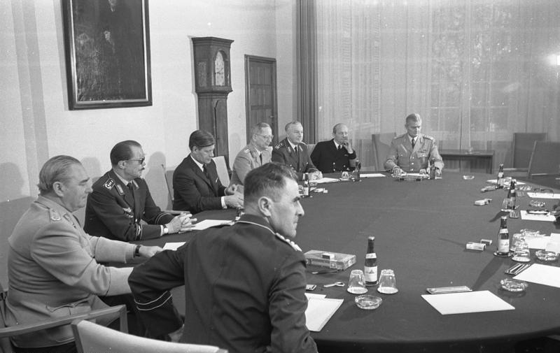 Bundeswehrführung bei Bundeskanzler Brandt in Bonn